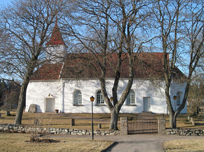 Eggvena kyrka